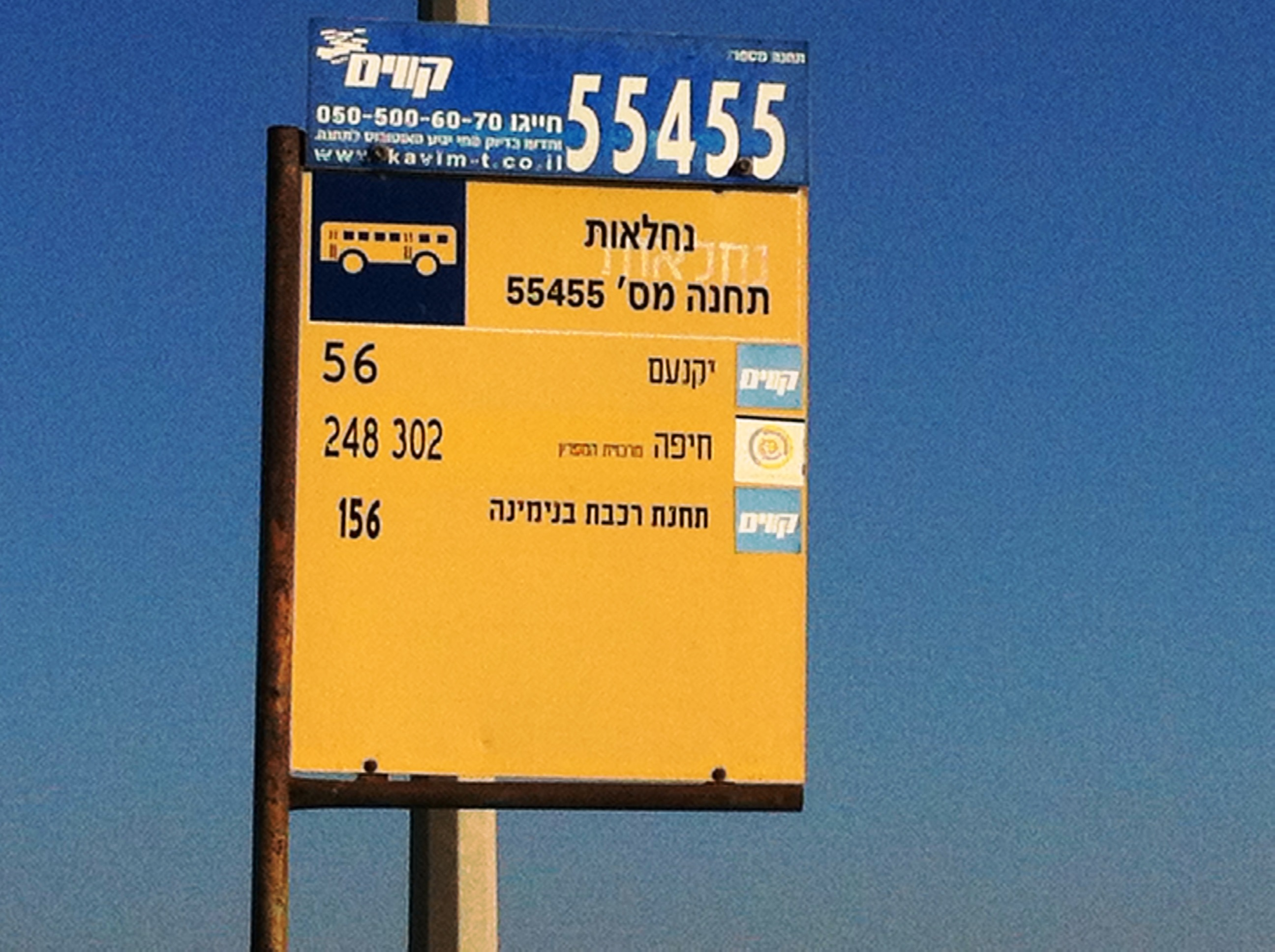 תחנת האוטובוס בקרבת החווה שנסגרה